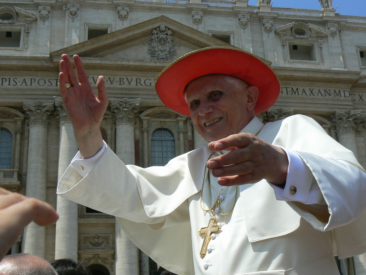 Papst Benedikt XVI. 2007